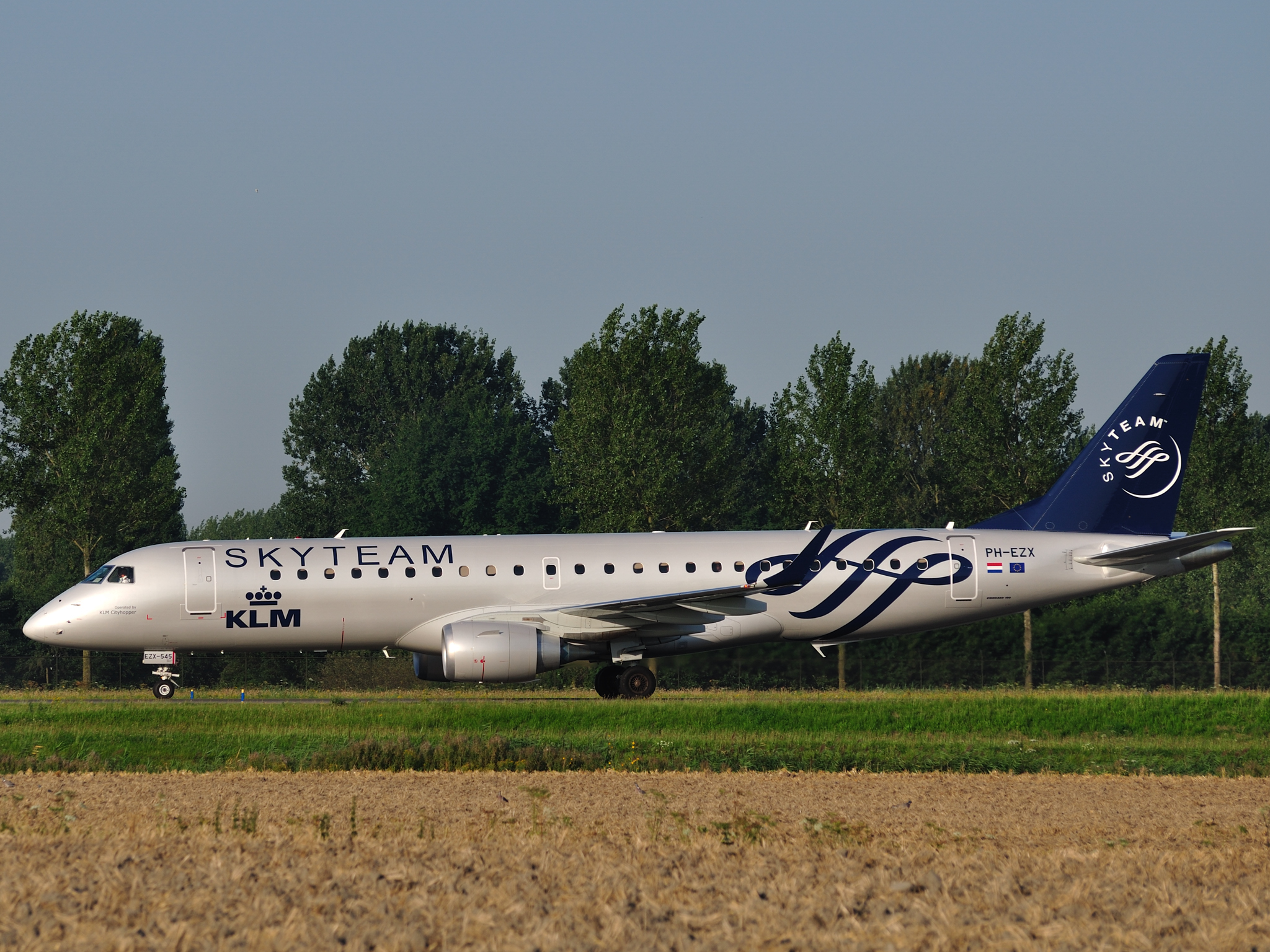 KLM Embraer 190 SkyTeam Livery PH-EZX